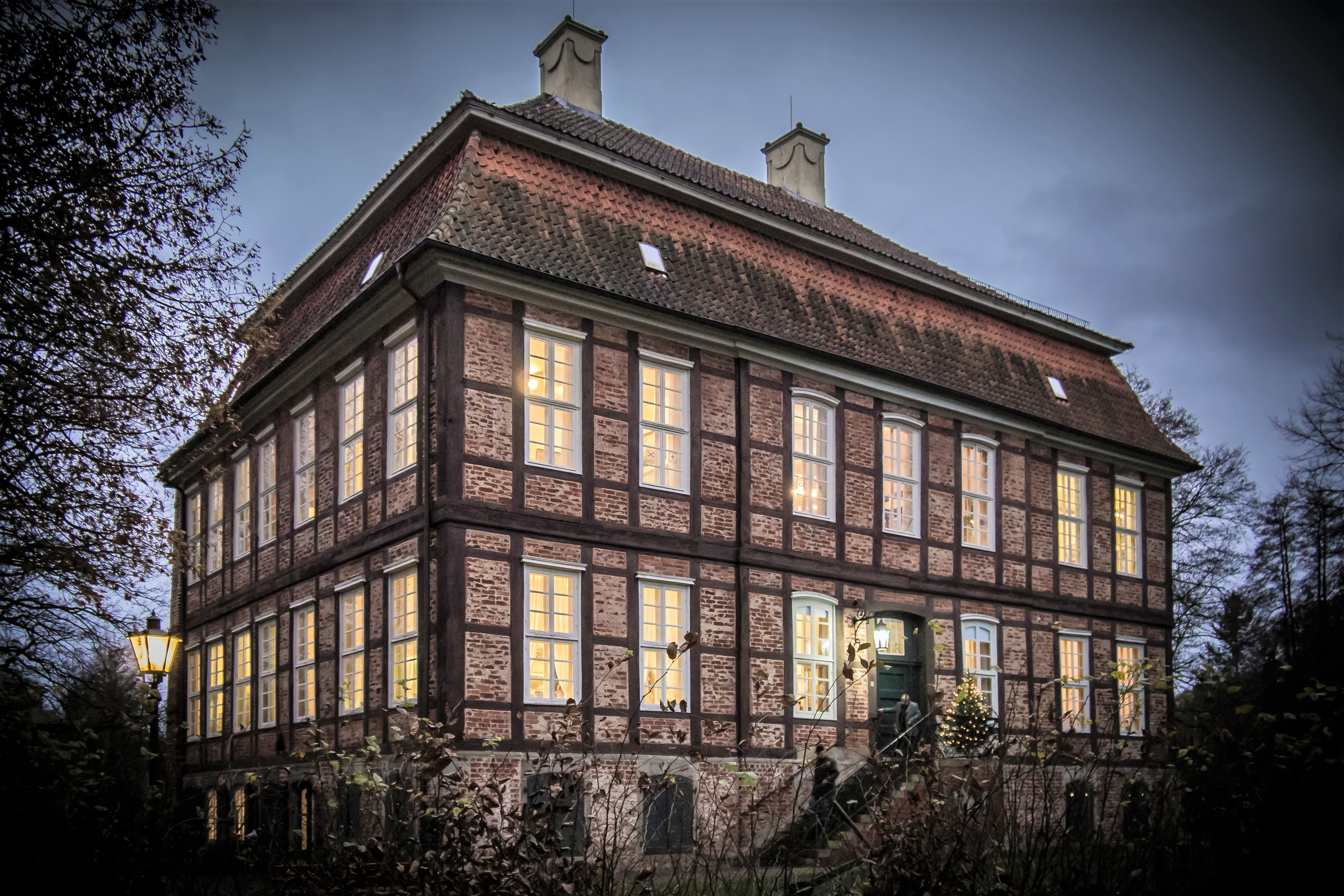 Schloss Schönebeck, Vegesacker Heimatmuseum in Bremen-Vegesack, Ortsteil Schönebeck, Im Dorfe 5. Südost-Fassade (links) und Nordost-Fassade mit Treppe (rechts). Das abgebildete Objekt ist ein geschütztes Kulturdenkmal in der Freien Hansestadt Bremen, mit der Nr. 1285 beim Landesamt für Denkmalpflege registriert.